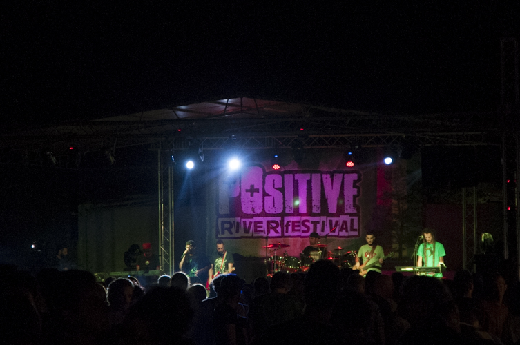 Positive River Festival - Quartiere coffee